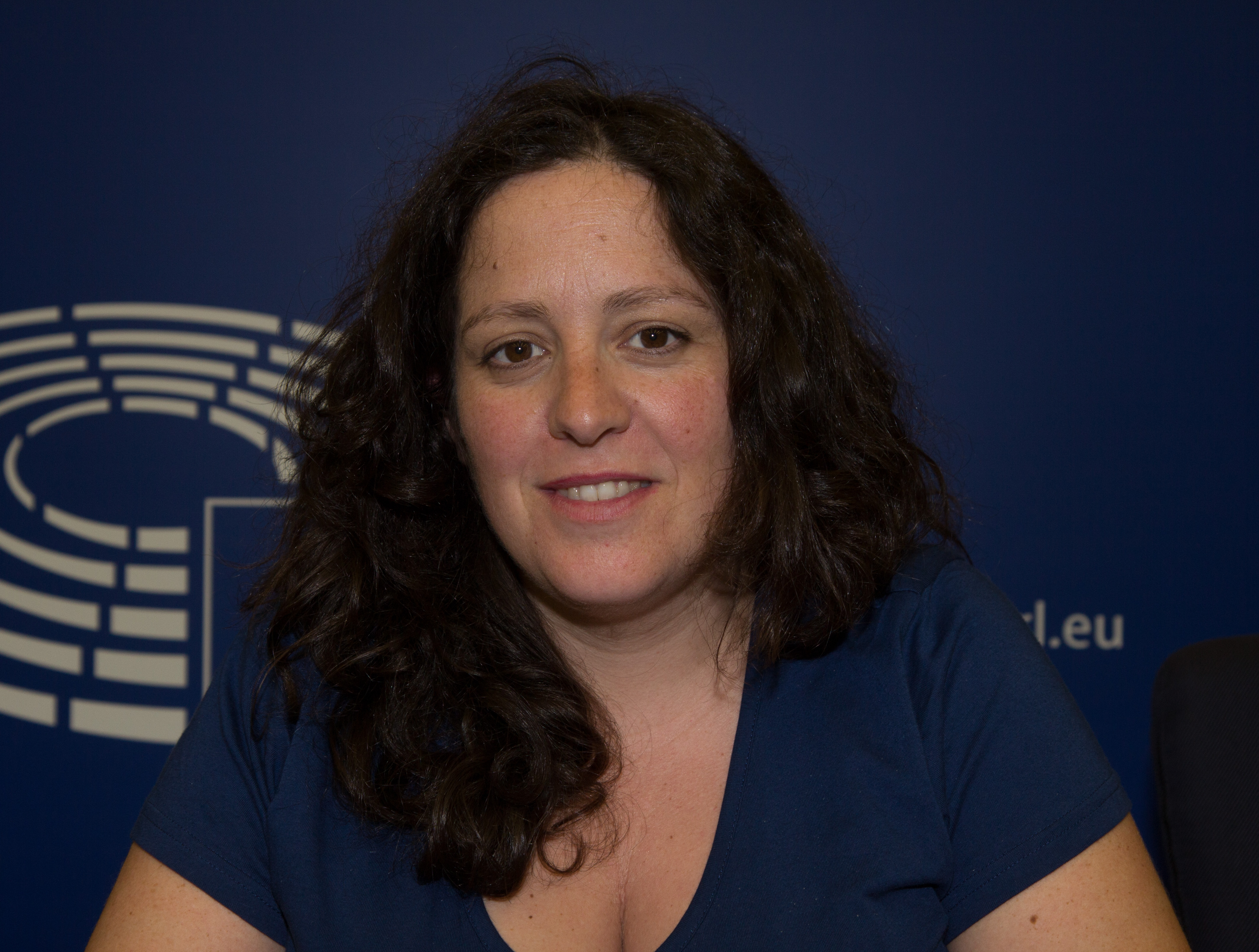 Sitzung des Europa Parlaments im Juli 2018 in Straßburg.